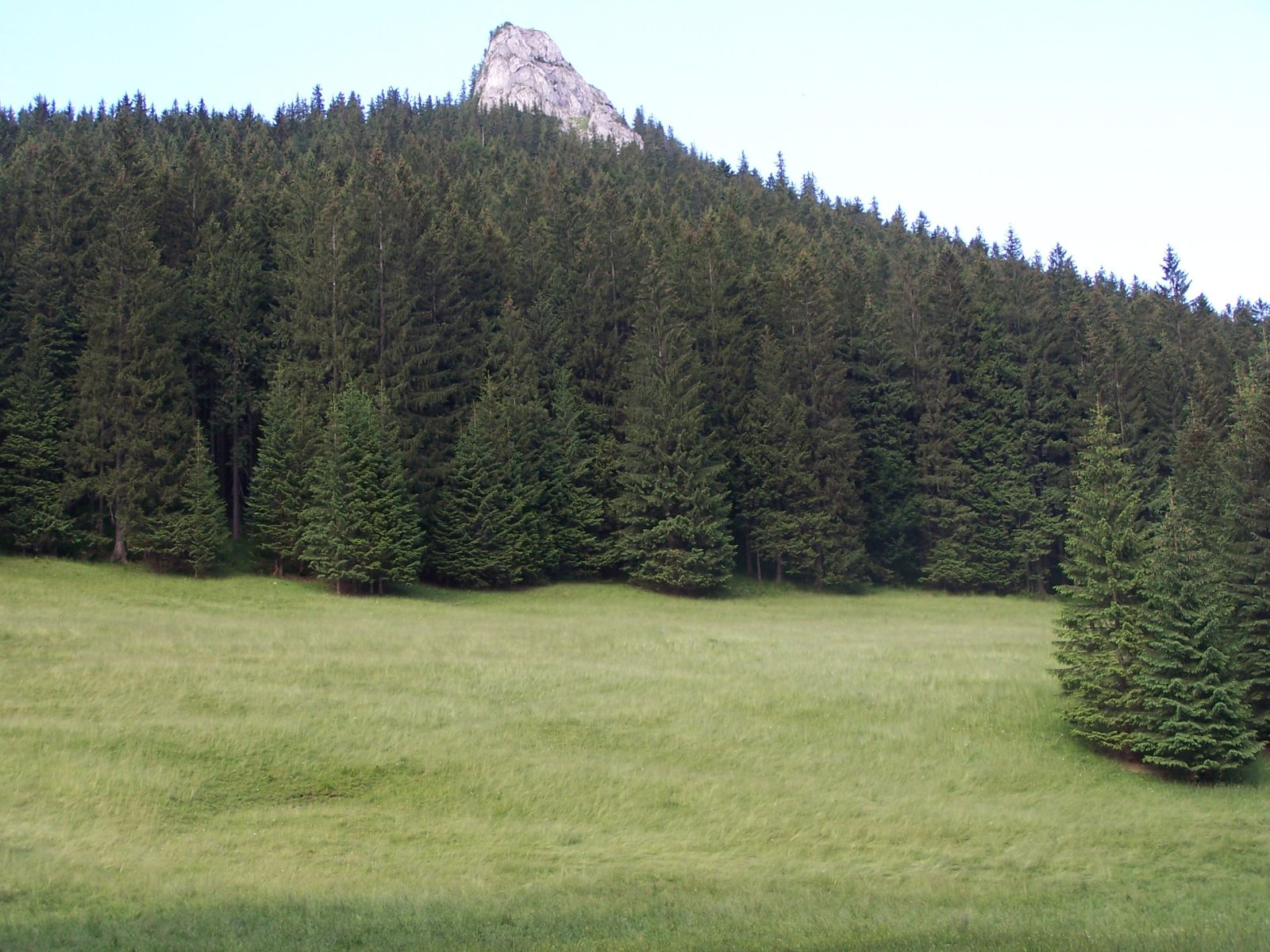 Zahradziska, Kończysta Turnia (West Tatra Mountains)